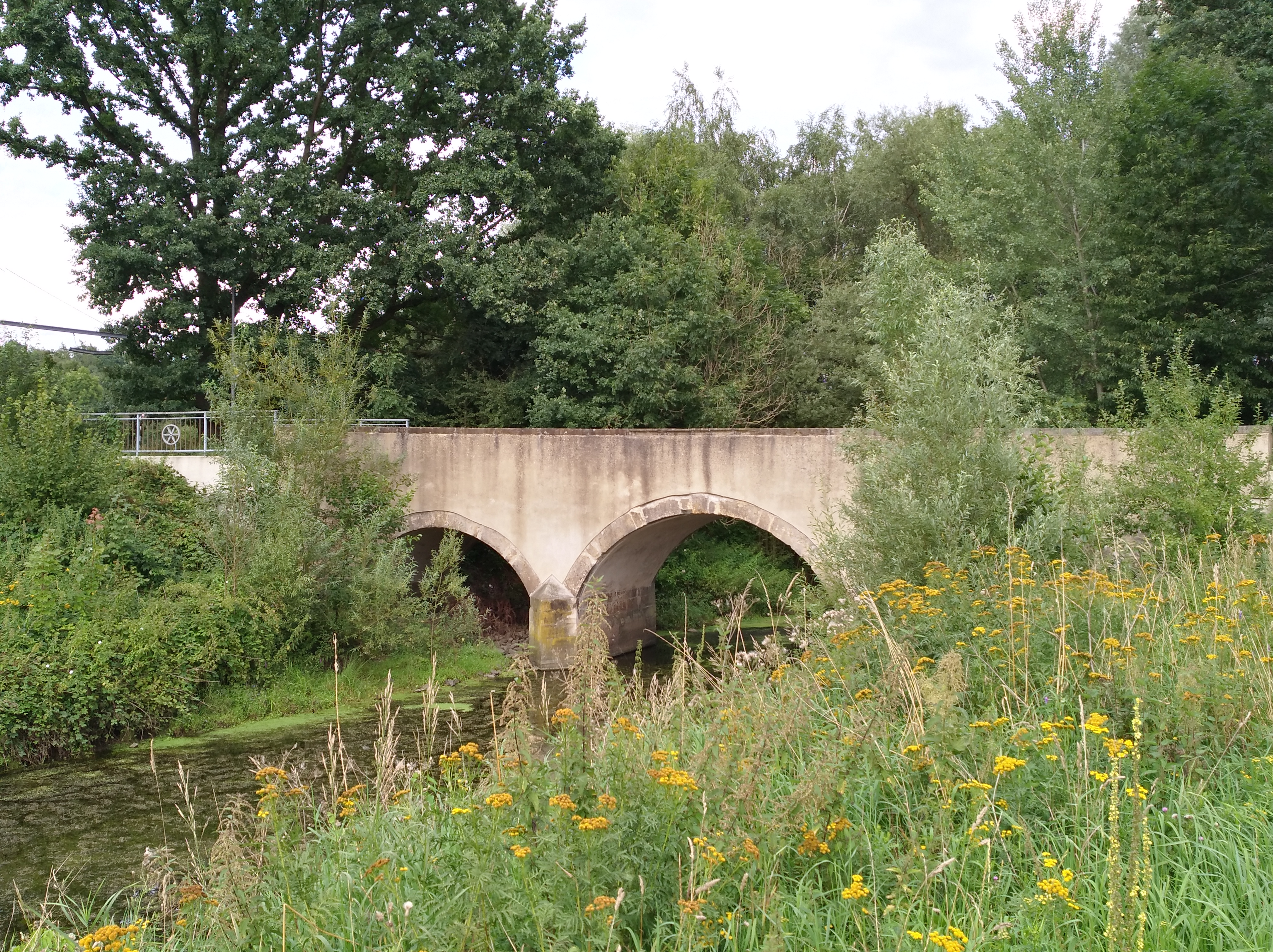 Die so genannte Römerbrücke als Teil der Straße "Die Eversburg" über einen Altarm der Hase in Osnabrück-Eversburg.